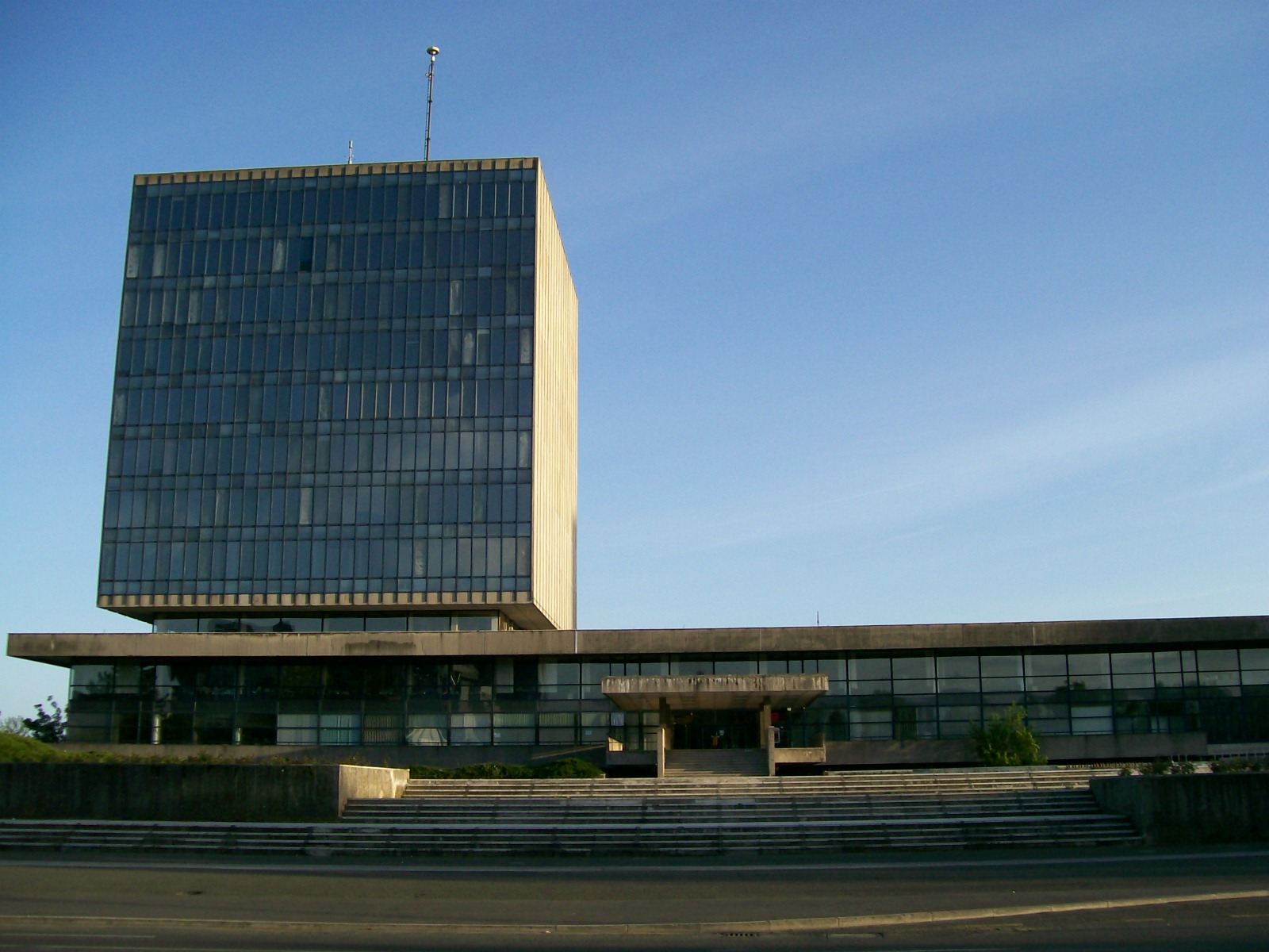 Kockica na Prisavlju u Zargebu